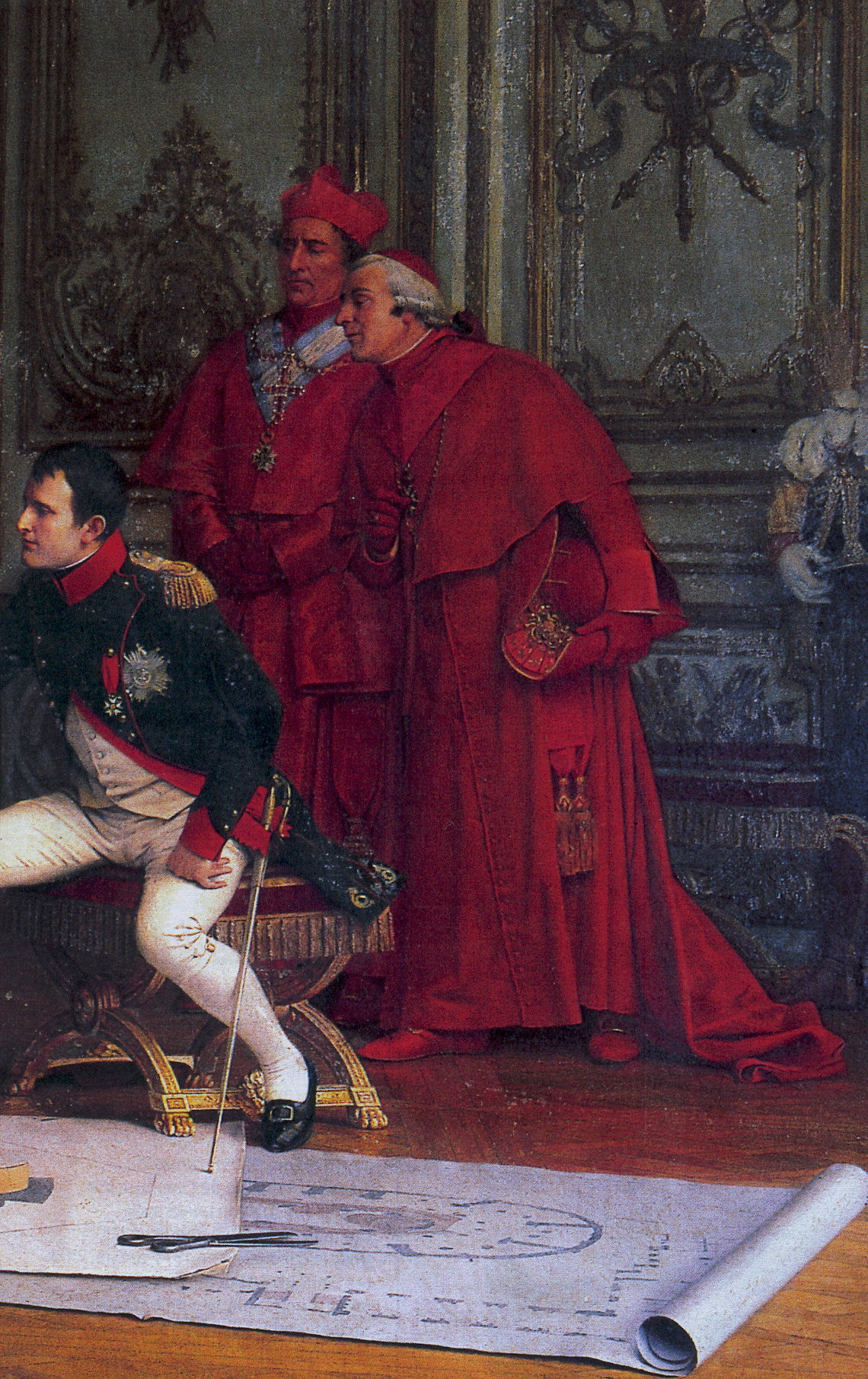 2 kardinalen aan het hof van keizer Napoleon. 19de eeuws schilderij, voorbereiding van de Kroning van de Keizer. Merk op; een van de kardinalen draagt een wereldlijk ereteken, het kruis van de Spaanse Orde van Karel III aan een blauw met wit lint. Een kardinaal draagt een rode baret de andere heeft in zijn handden de kardinaalshoed vast die met koorden en knopen is versierd; bij hem bemerken we ook de kleine cappa magna.